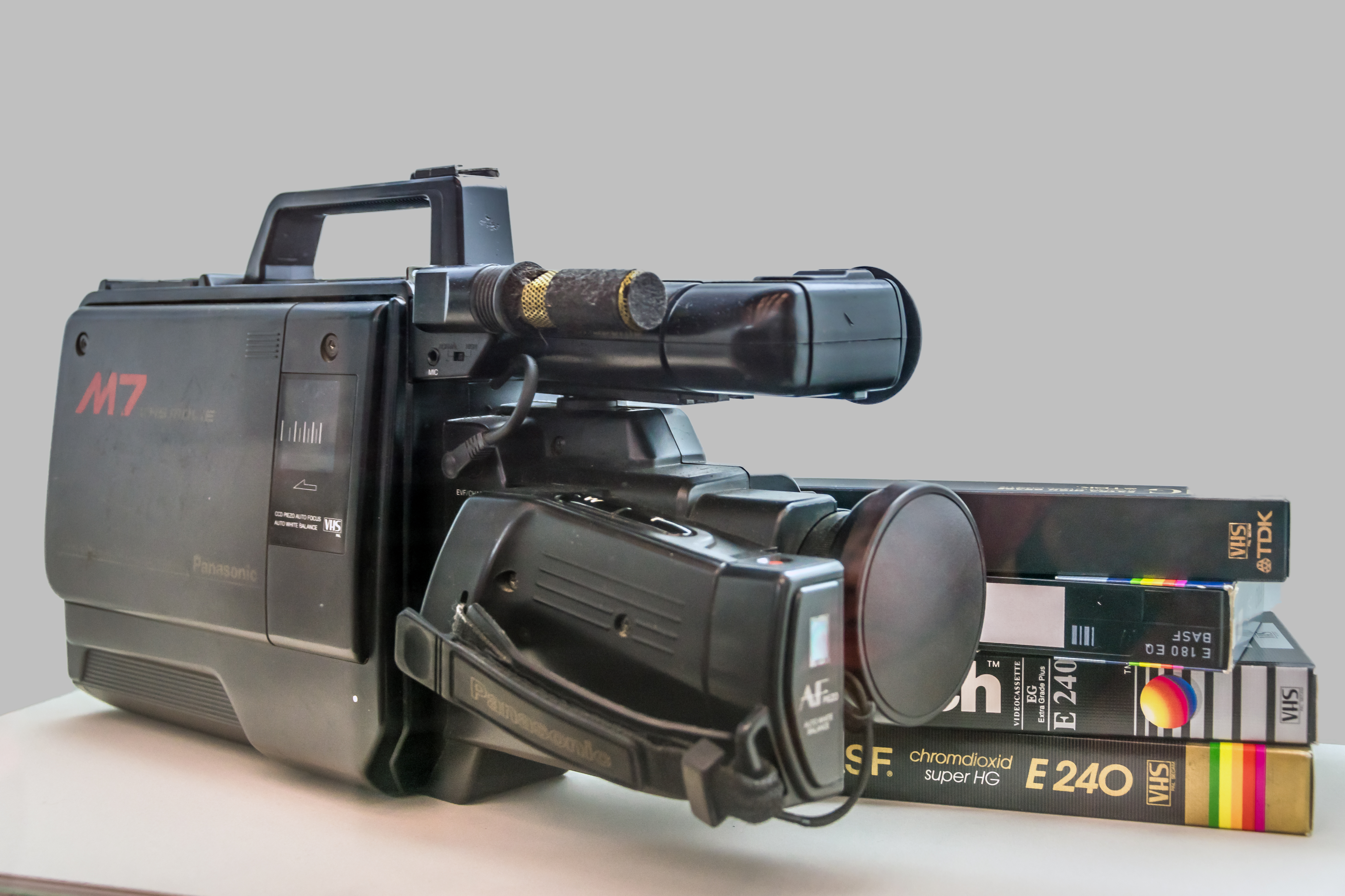 Die Videokamera, mit der Siegbert Schefke zusammen mit Aram Radomski die Montagsdemonstration vom 09. Oktober 1989 am Leipziger Ring aufgezeichnet hatte.